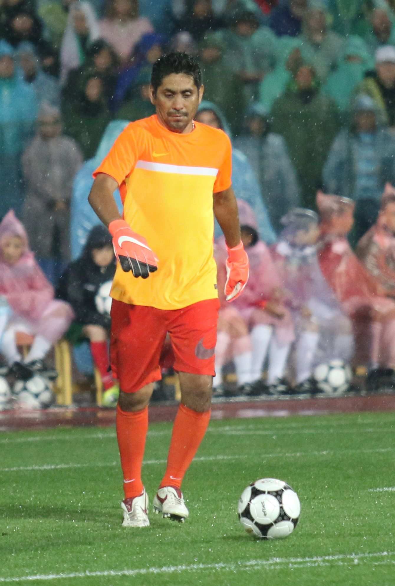 Хорхе Кампос- бивш мексикански футболист, вратар. Висок едва 168 см. и се отличава с уникалния си стил на игра и акробатични спасявания. Хорхе е участник на 3 световни първенства и има 130 записани участия с националната фланелка на Мексико.